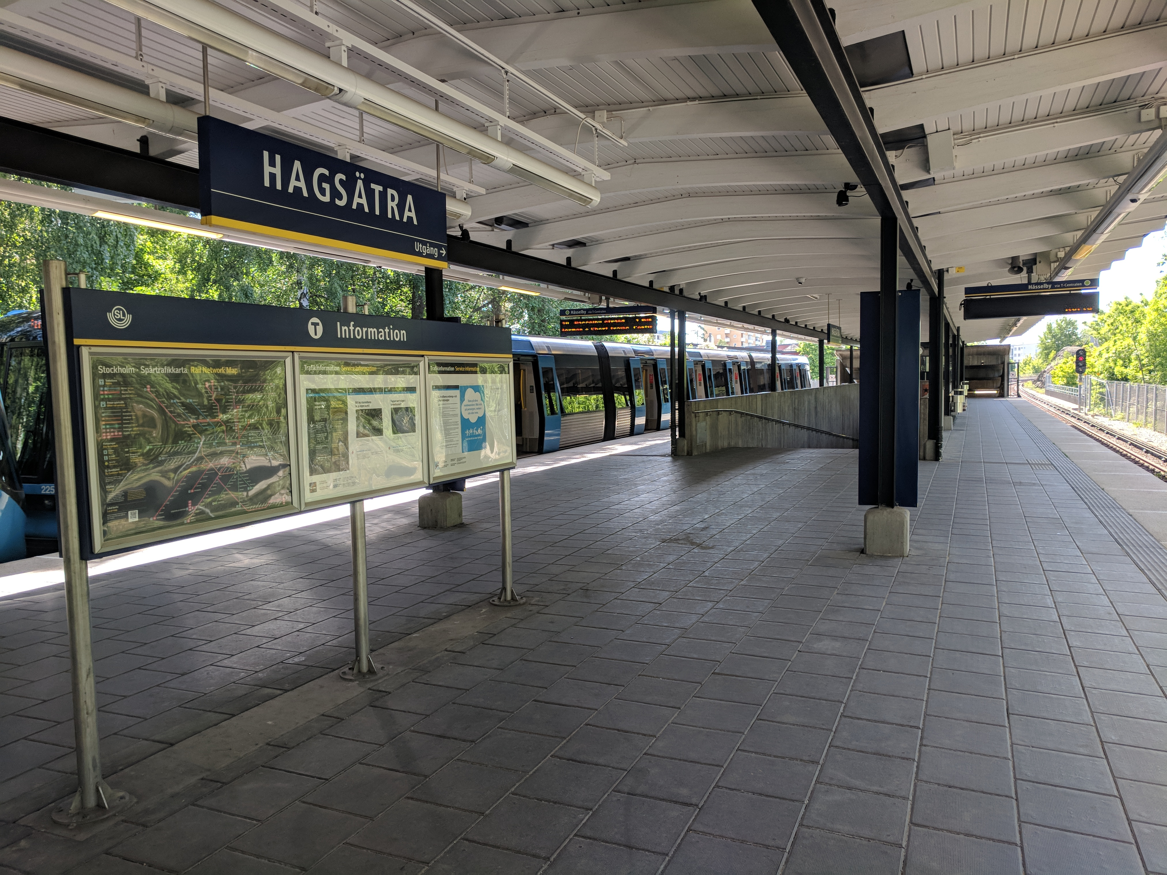 Hagsätra Metro